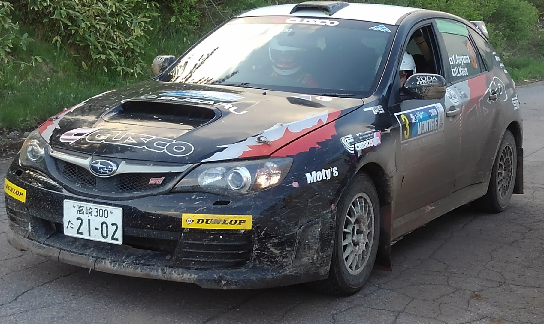 2019年ラリーモントレーのスバル・インプレッサWRX STI